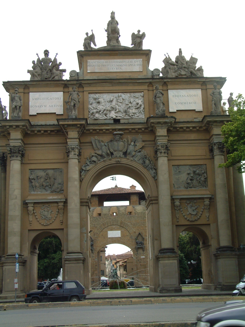 Италия, Флоренция